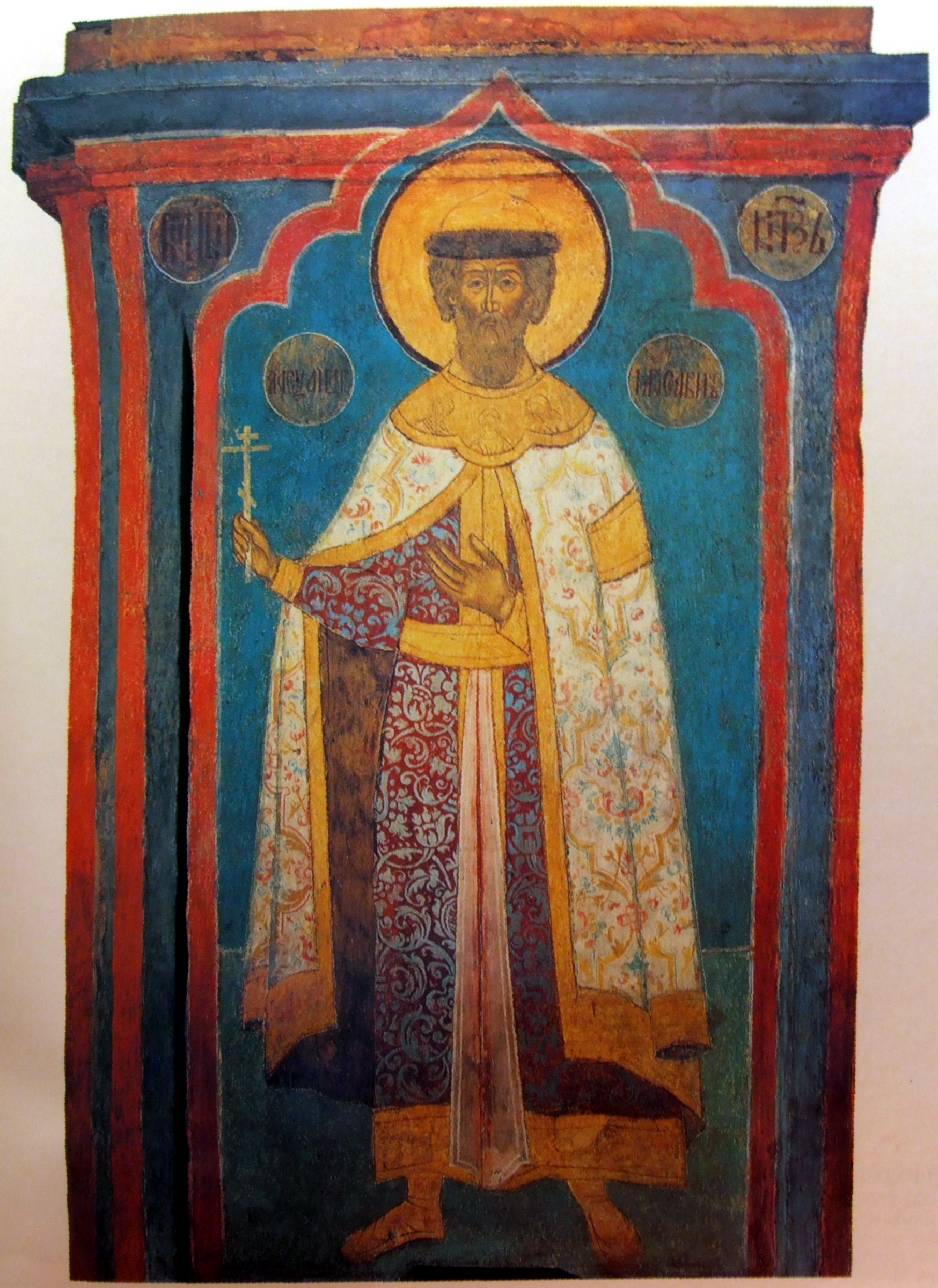 Святой Александр Невский. Фреска, 1666 г., Москва, Кремль, Архангельский собор, роспись юго-восточного столпа